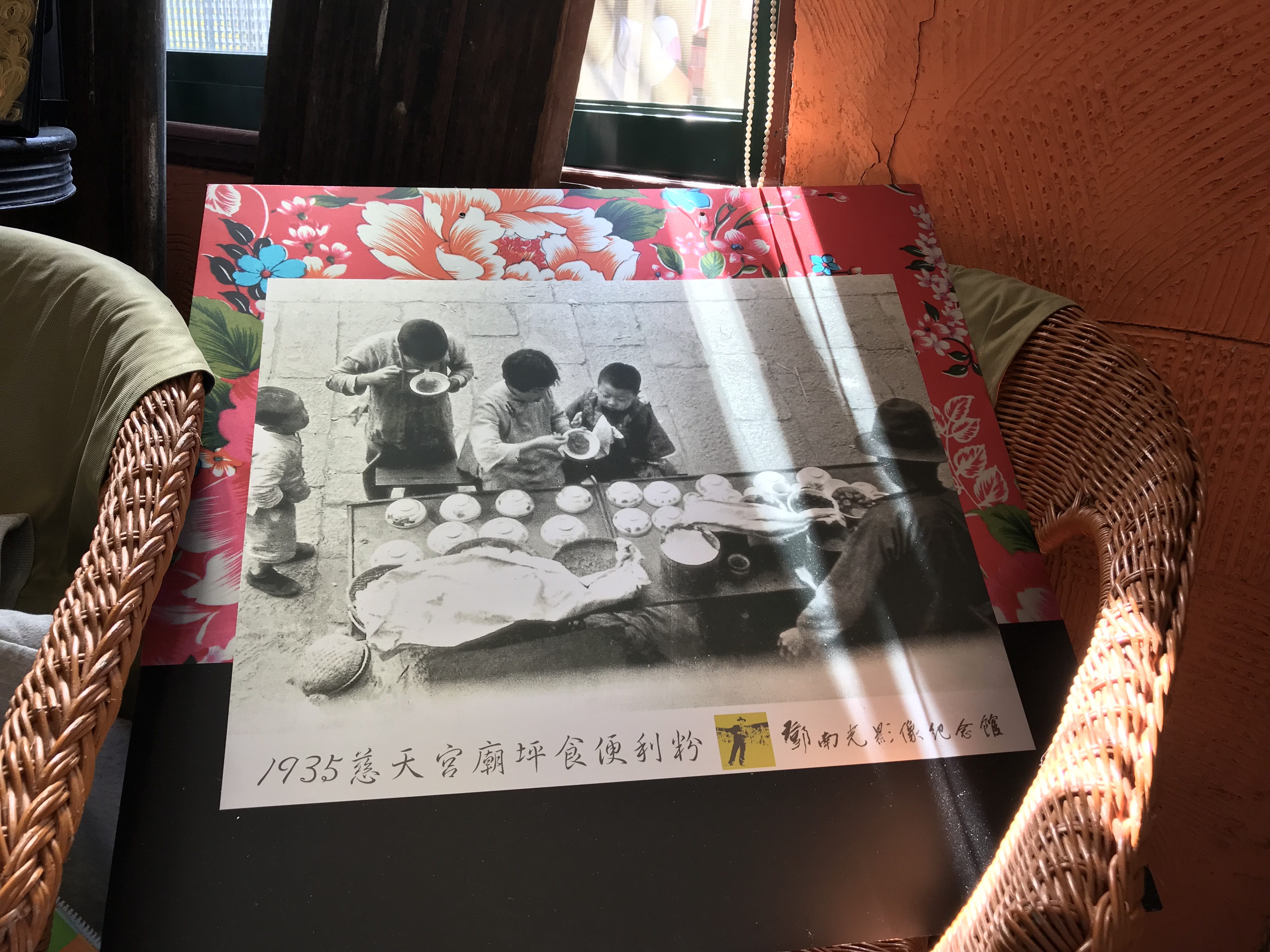 鄧南光對北埔慈天宮廟坪的照片。